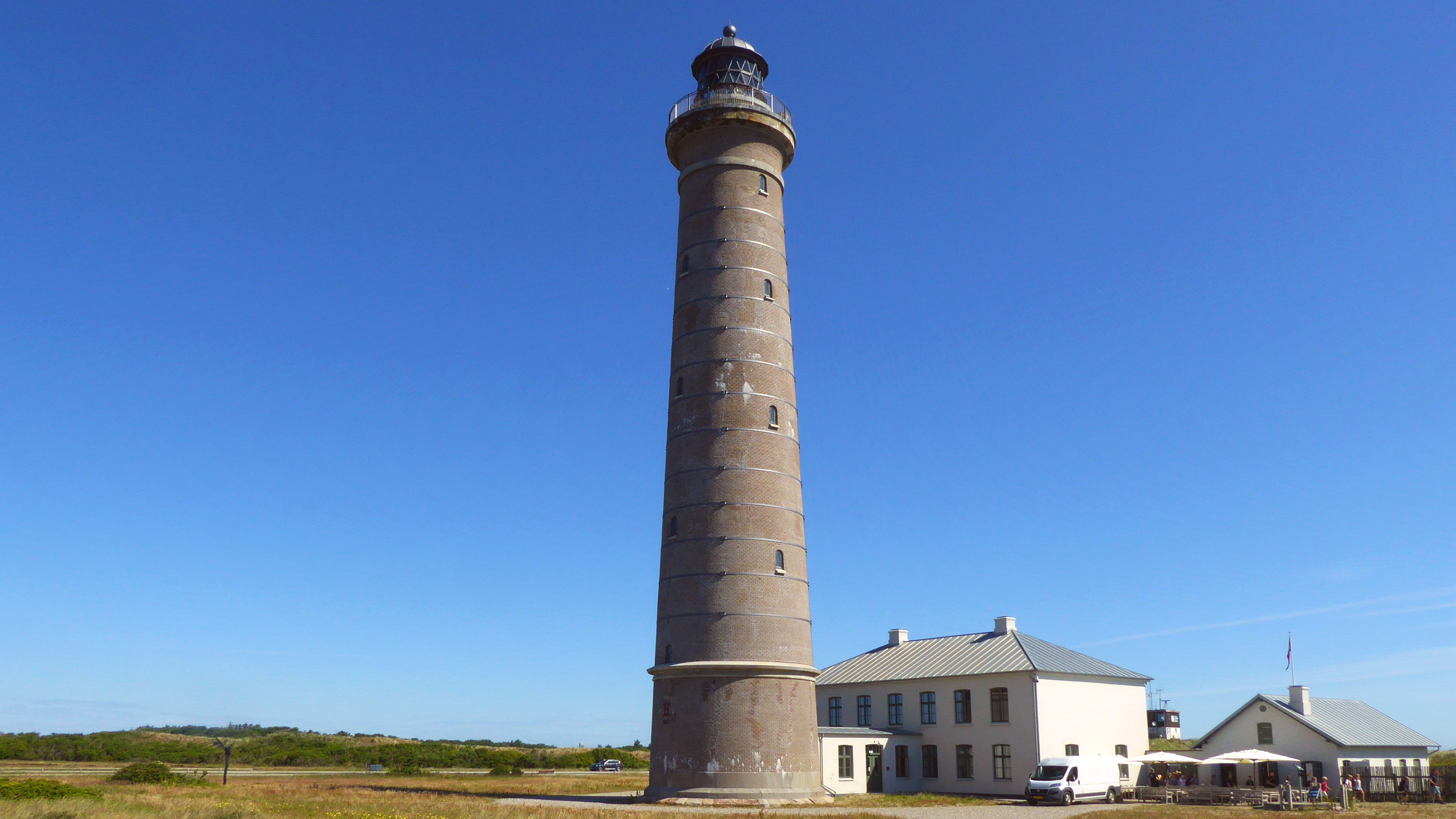 Leuchtturm Skagen Grå Fyr aus Jahr 1858 Höhe 46 m - Foto 2018 Wolfgang Pehlemann P1220418